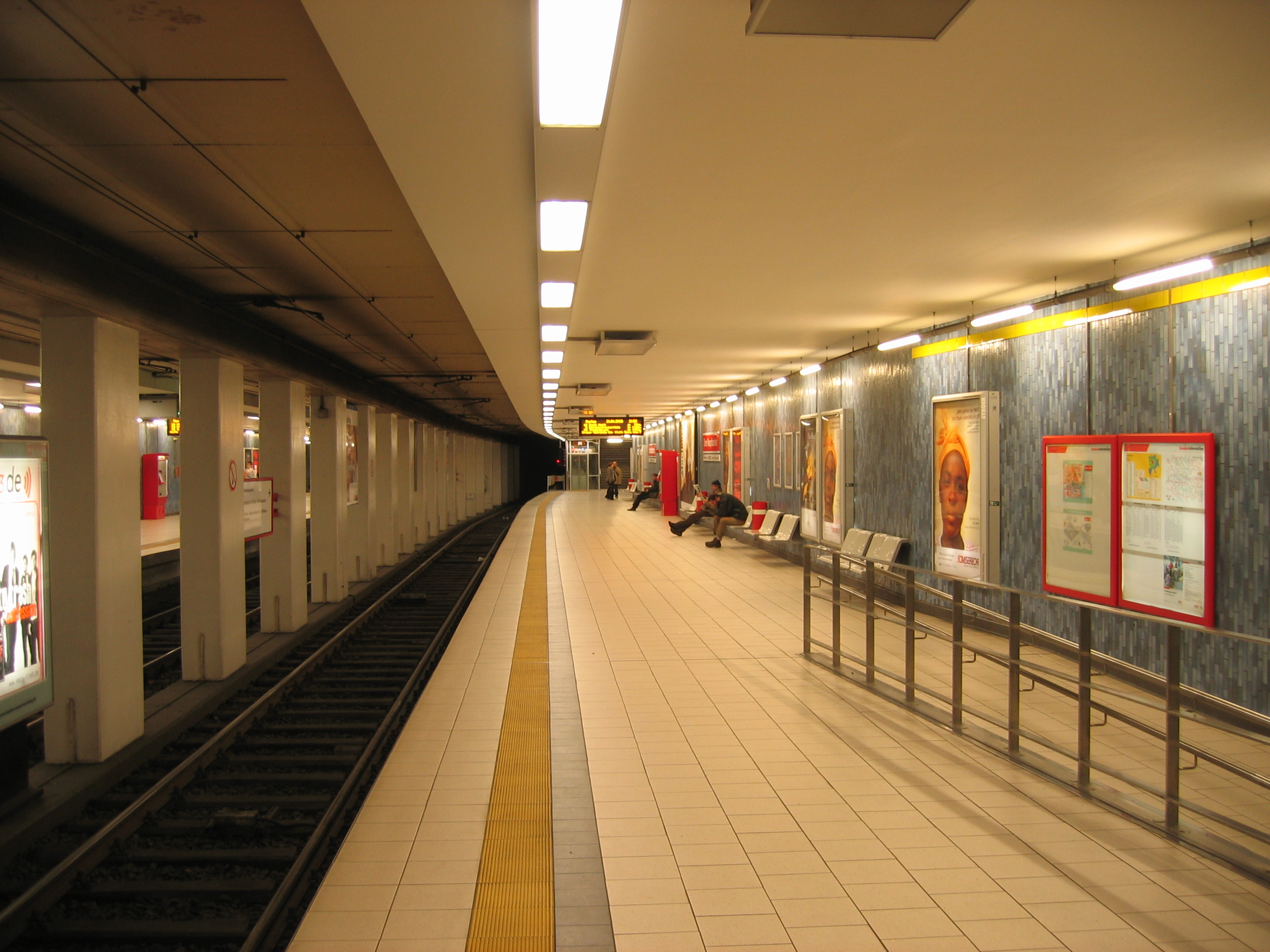 U-Bahn-Station Dom/Hbf der Stadtbahn Köln